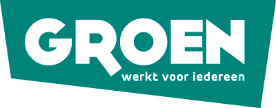 Logo van Groen (partij)